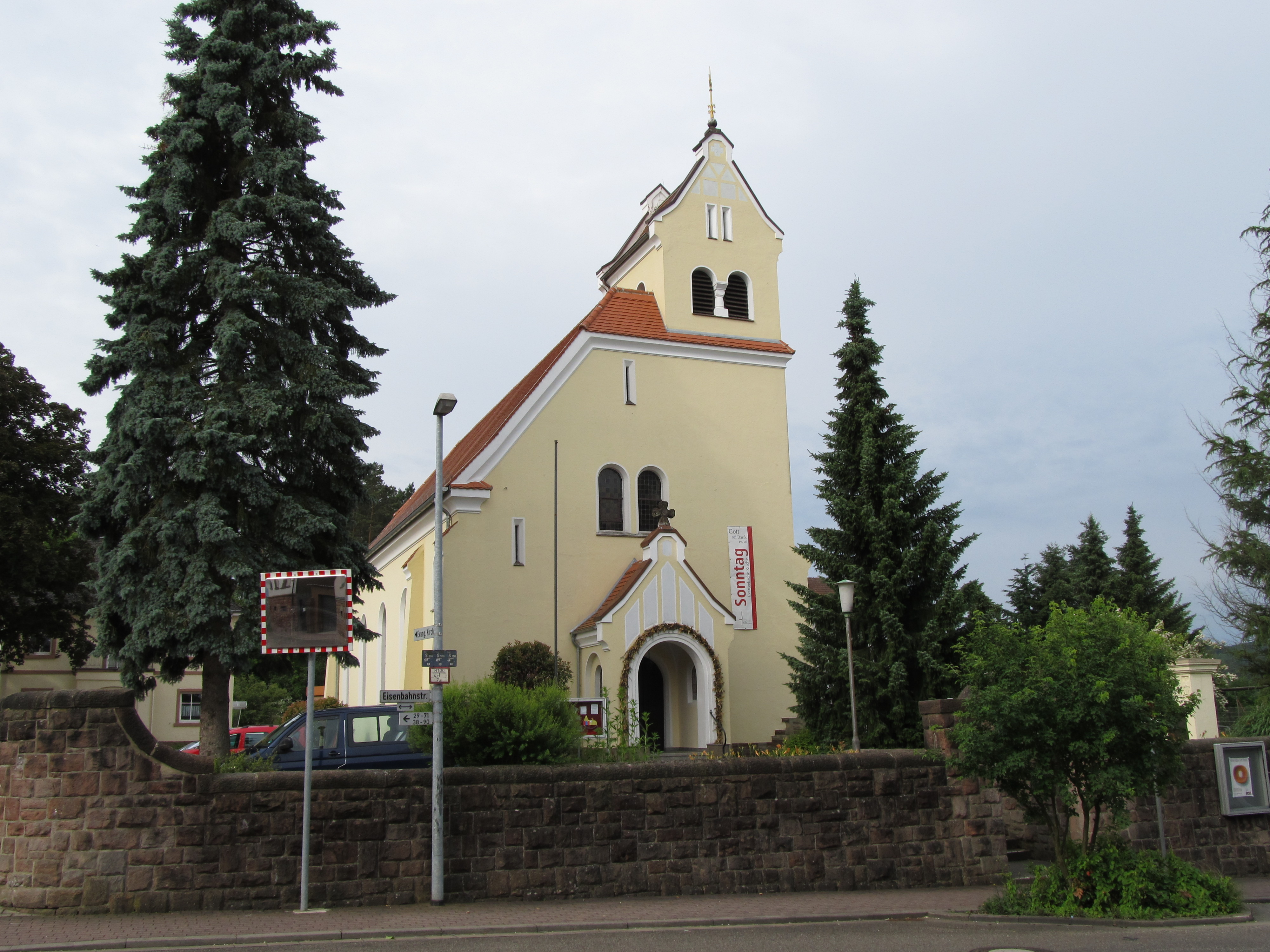 Die protestantische Kirche in Hassel, Saarland